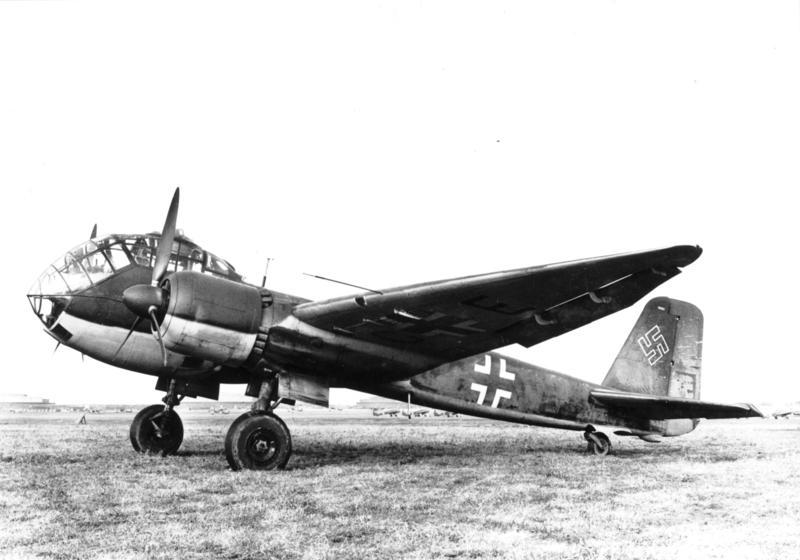 Junkers Ju 188 E-1, Kampfflugzeug Werkfoto Junkers (MBB) 188/6